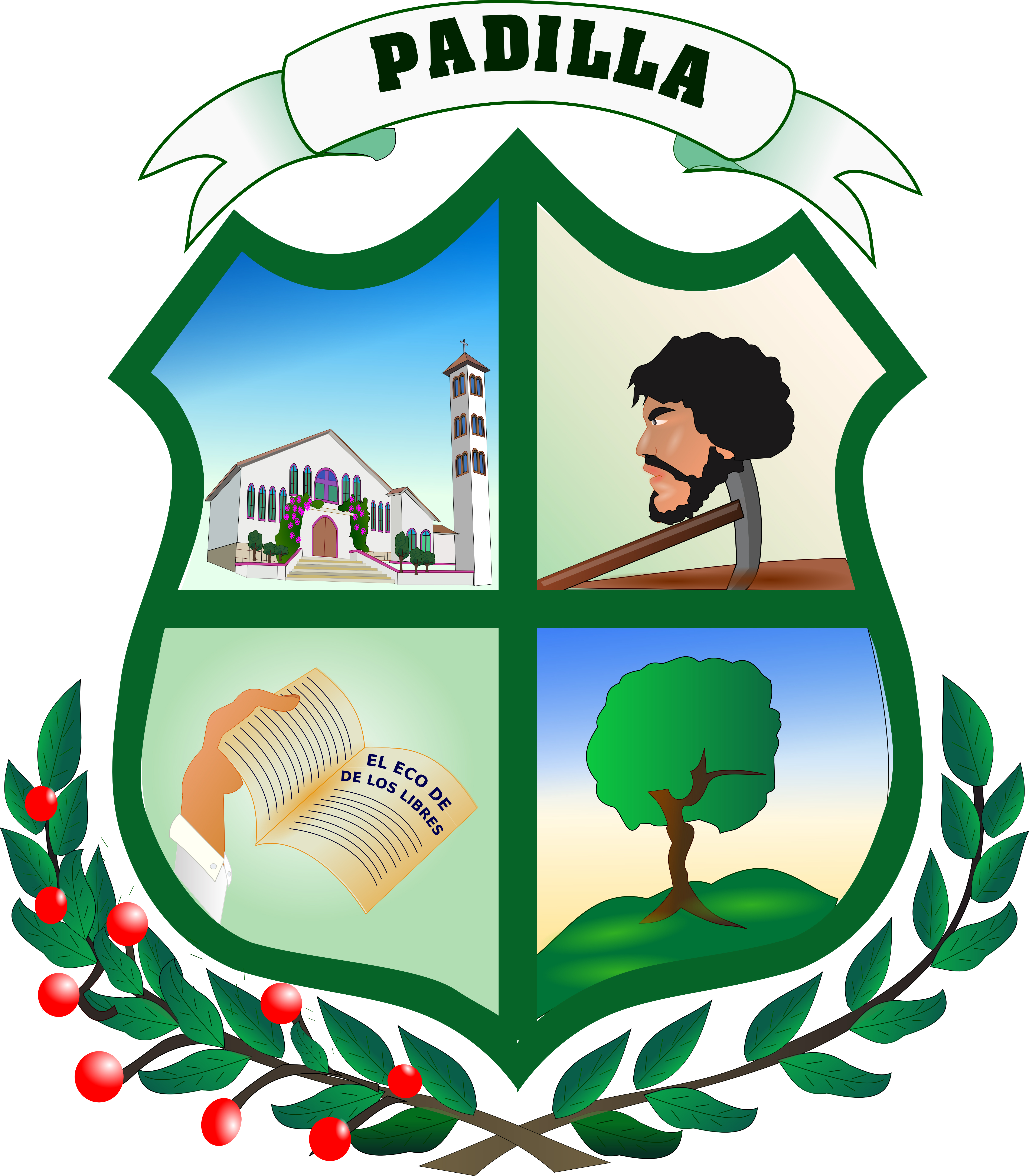 Escudo de padilla